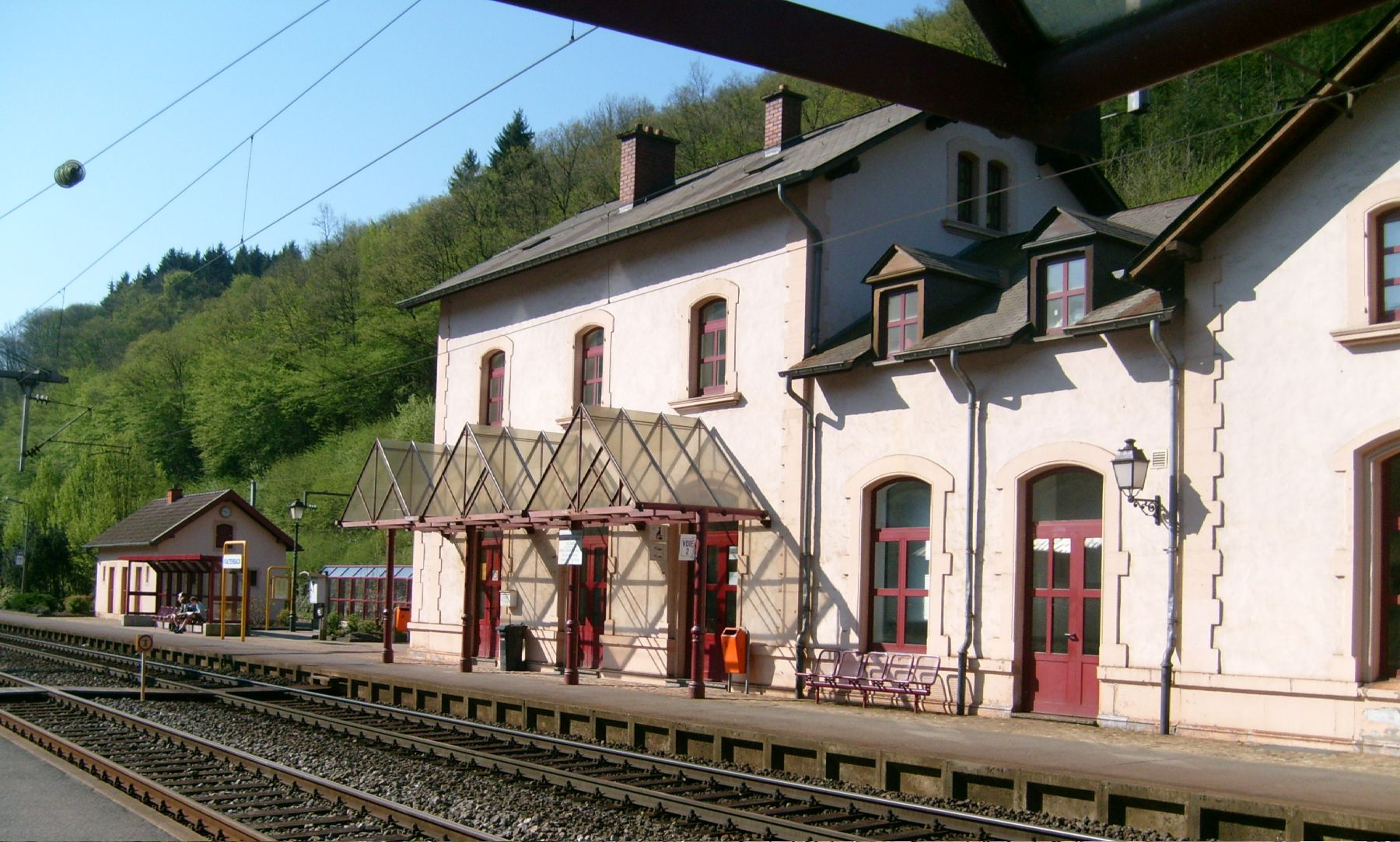 D'Gare vu Kautebaach, 7. Mee 2008.